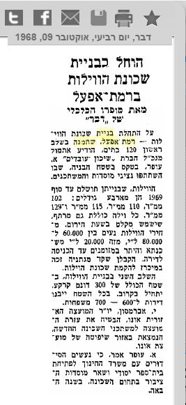 הקמת שכונת הוילות ברמת אפעל